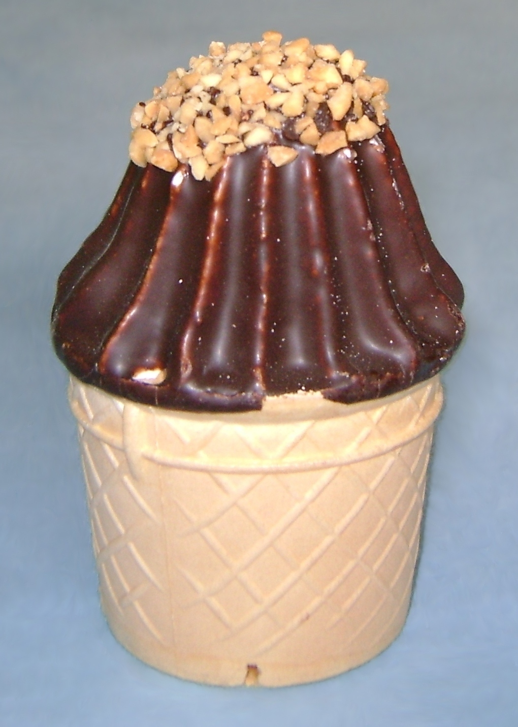 Ciepłe lody wyprodukowane w jednej z łódzkich cukierni. (Tło edytowane w programie GIMP.) Zobacz też zdjęcie tego samego loda po przekrojeniu na pół: Warm ice cream 2.JPG.